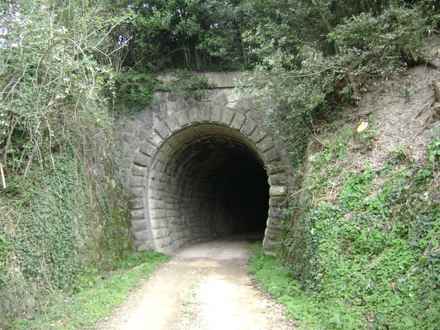 Ulaz u Motovunski tunelna trasi "Parenzane"